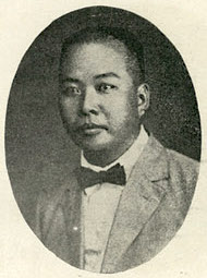 Bân-lâm-gú: Kí Tióng (紀長)